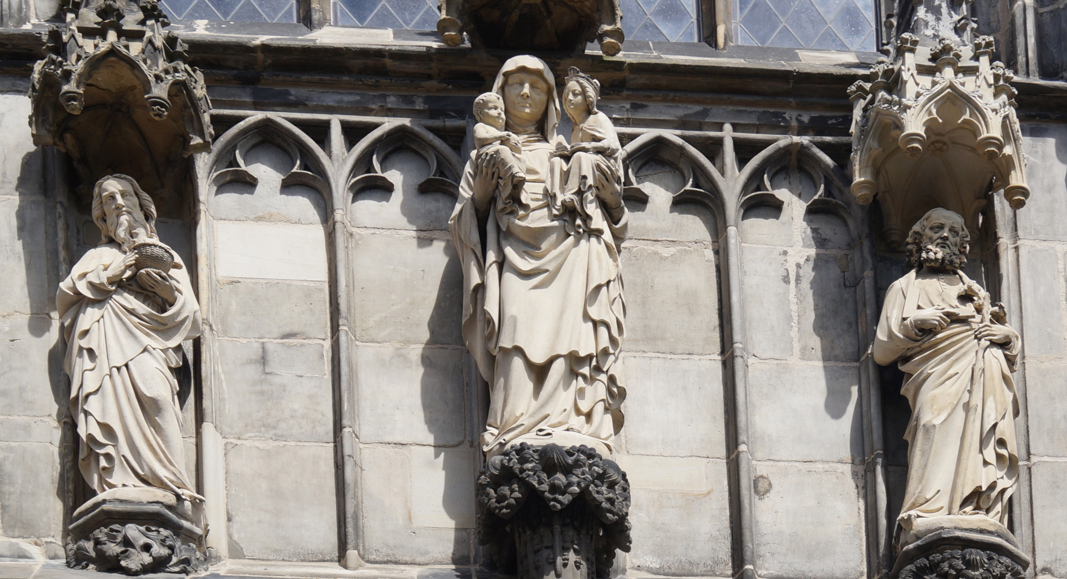 Aachener Dom: Annakapelle Statuen Heilige Sippe